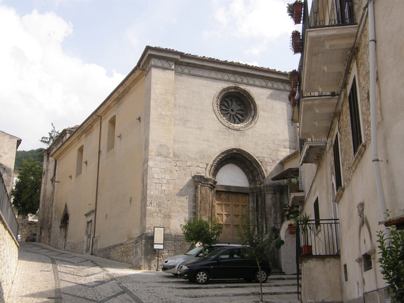 Caramanico Terme, chiesa di San Domenico.